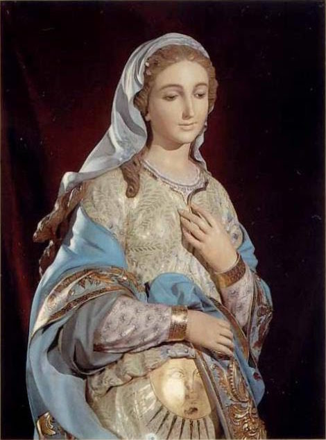 La Mare de Déu de l'Esperança d'Onda, obra de Josep Rabassa (1956)